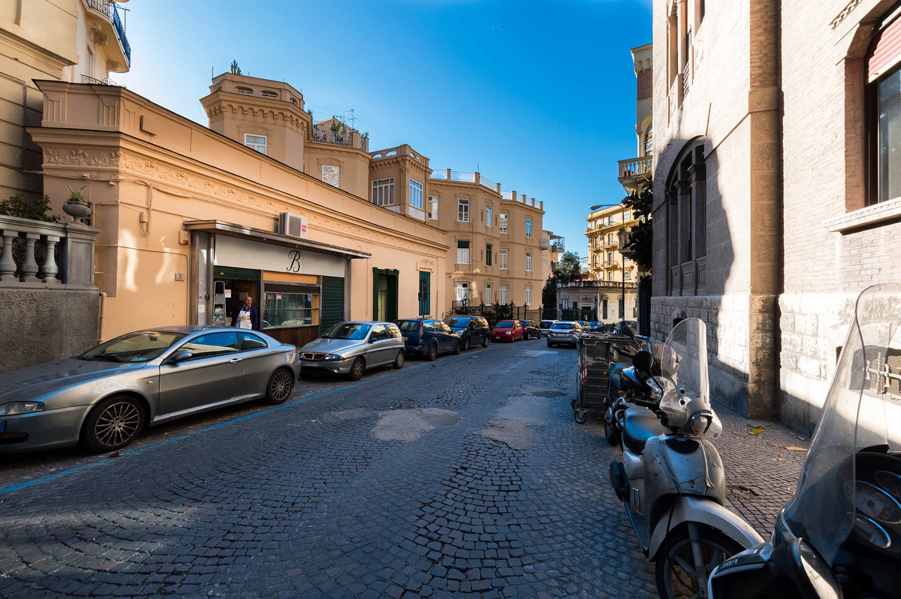 Prospetto della palazzina Rocco vista dal lato a monte